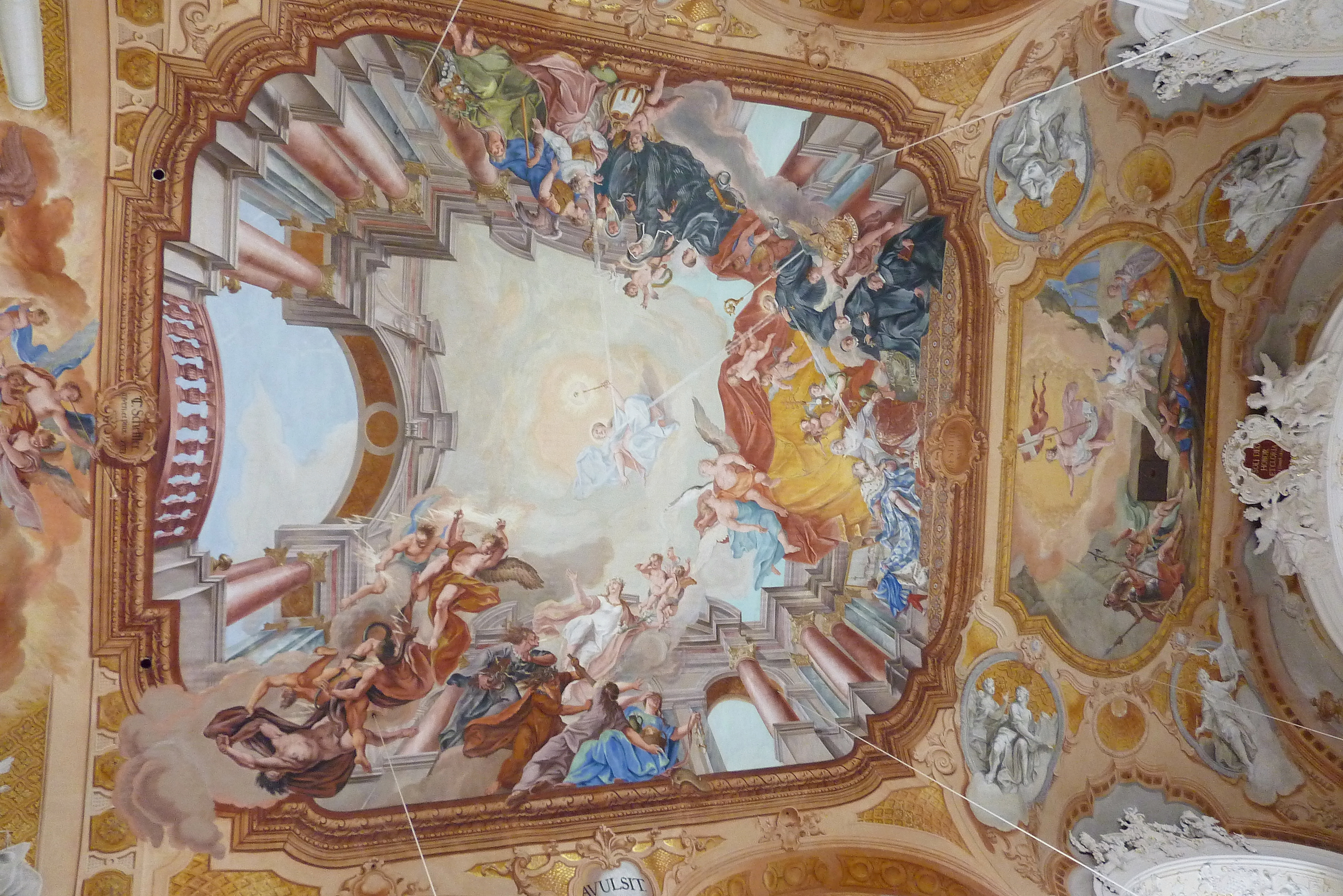 Katholische Pfarrkirche, ehemalige Kloster- und Wallfahrtskirchellfahrtskirche St. Leonhard in Unterliezheim, einem Ortsteil von Lutzingen im Landkreis Dillingen an der Donau (Bayern), Langhausfresko von Christoph Thomas Scheffler, signiert: CT. Scheffler. inven: et pinx: ano 1733; Darstellung: Geschichte des Klosters Unterliezheim, (angebliche Gründung 1152 durch Gräfin Jutta von Werdenberg - Kartusche mit Inschrift: Fundavit MCLII; Aufhebung des Klosters 1542 durch Herzog Ottheinrich von Pfalz-Neuburg - Kartusche mit Inschrift: Avulsit MDXXXXII; Verkauf des Klosters 1655 an St. Ulrich und Afra von Augsburg - Kartusche mit Inschrift: Comparavit MDCLV